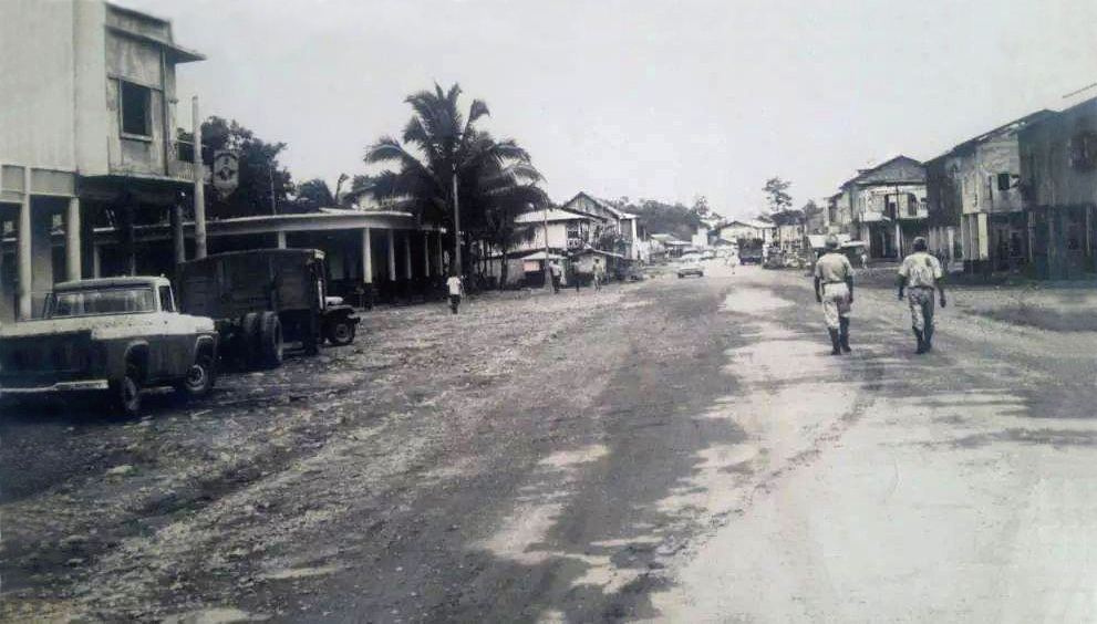 Old years Valencia city